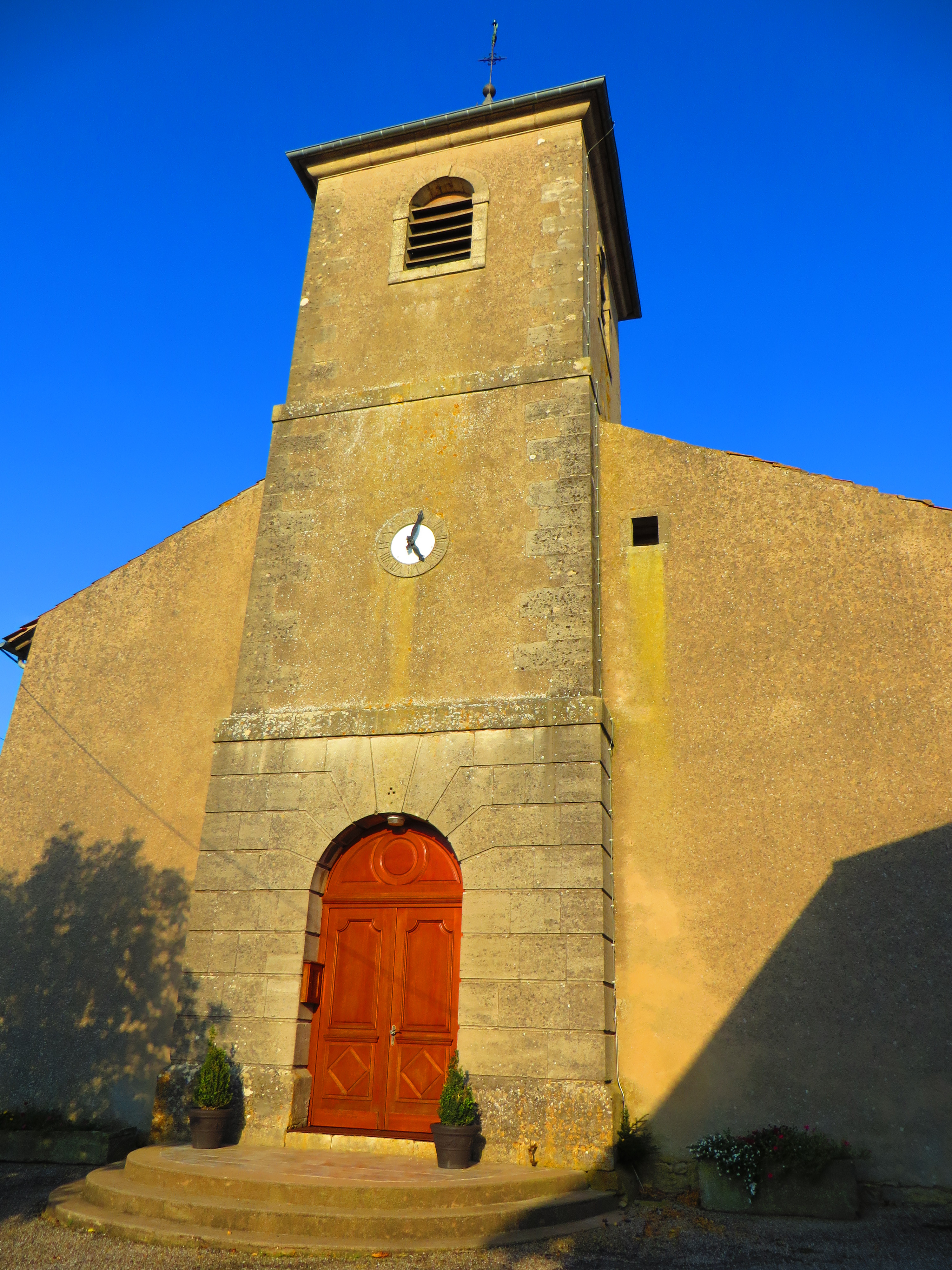 Château-Voué l'église Saint-Martin